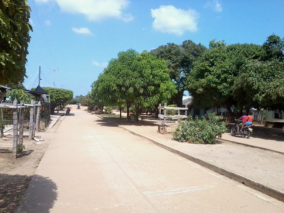 pavimentada